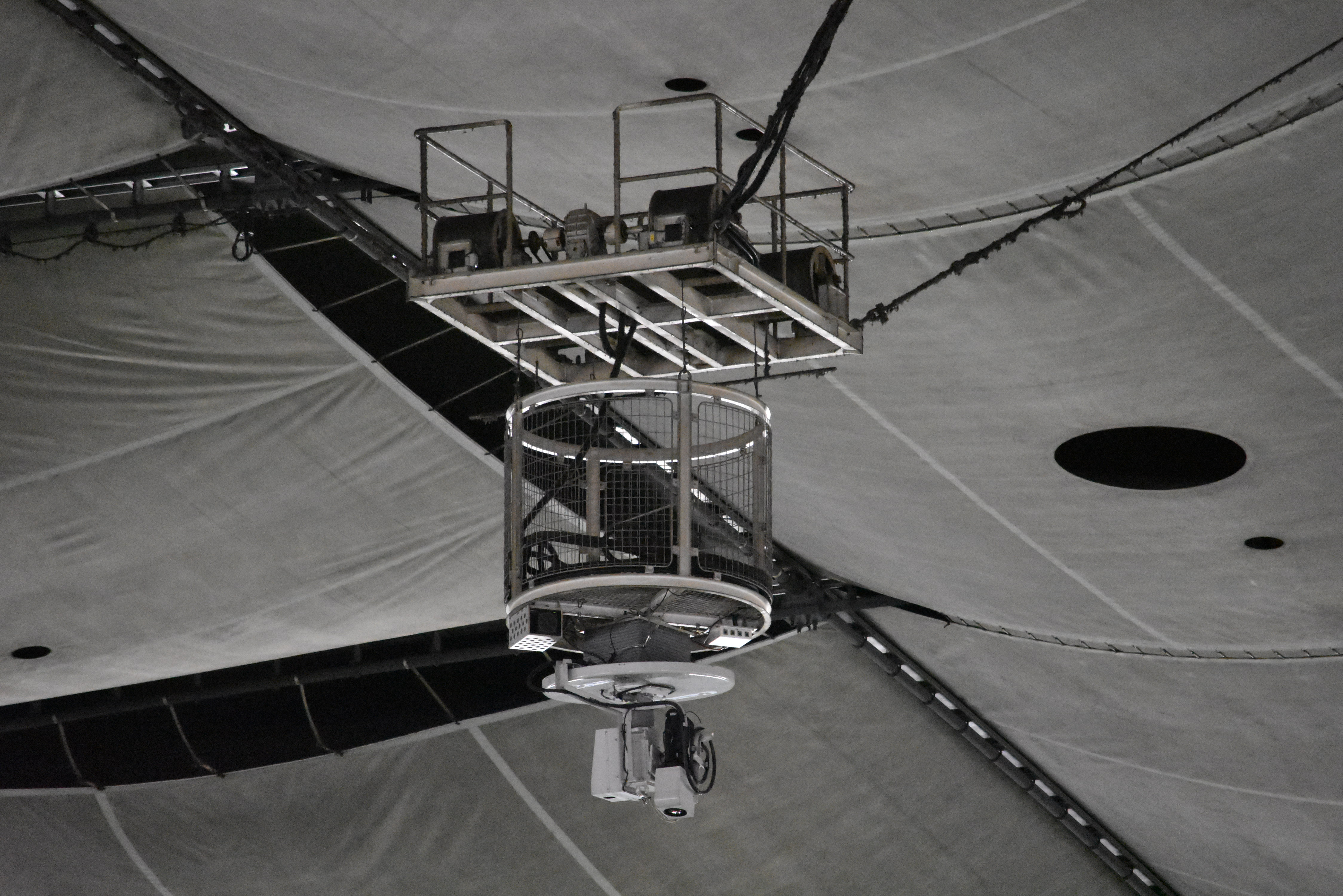 東京ドーム Nikon D3400